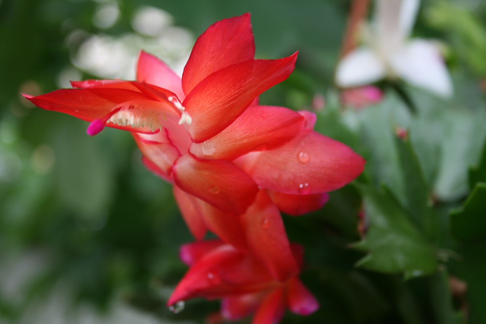 Schlumbergera truncata (Rhipsalideae; Cactaceae; Planta) kaktusz 'Exotic Dancer' változatának virága